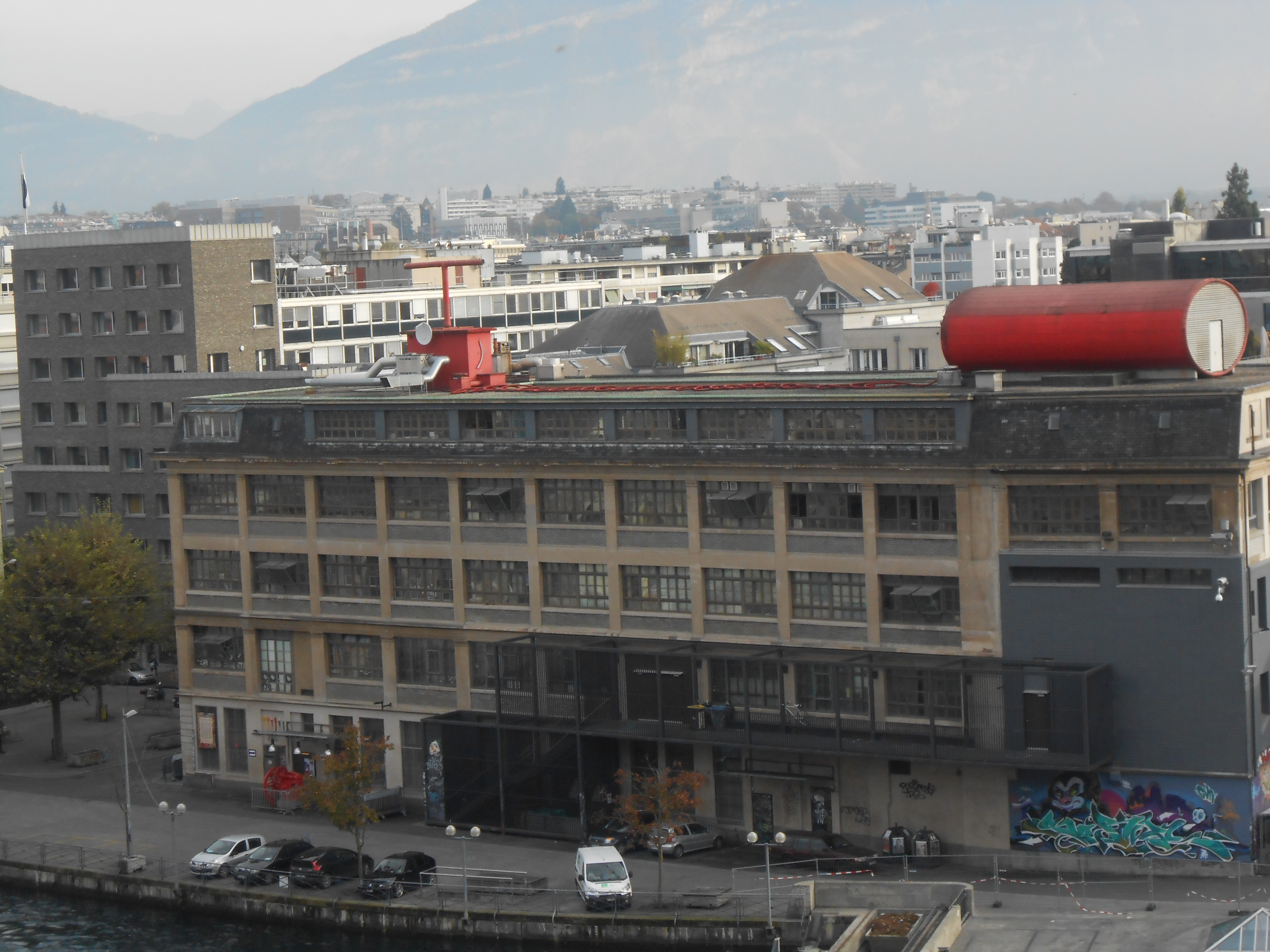 Installation du groupe KLAT- Toit de l'Usine de Genève